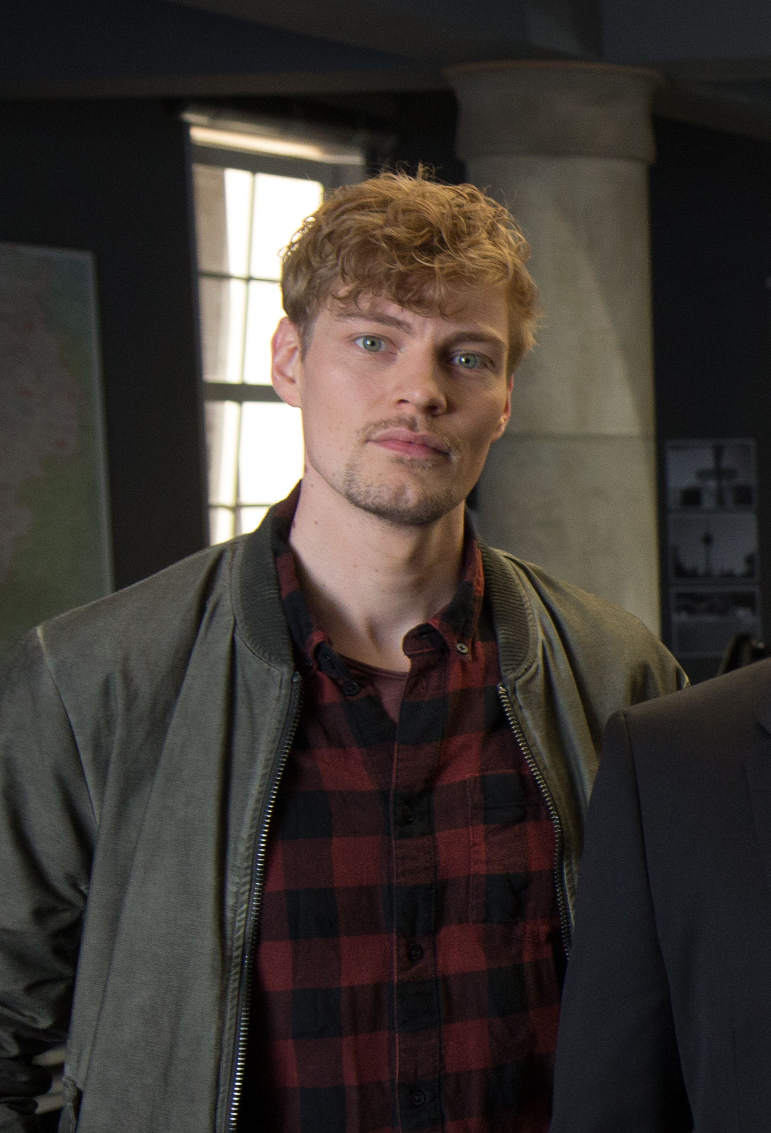 Pressetermin am Set der ZDF-Krimiserie "Professor T." mit den Hauptdarstellern Matthias Matschke, Andreas Helgi Schmid, Paul Faßnacht, Julia Bremermann und Axel Schneider